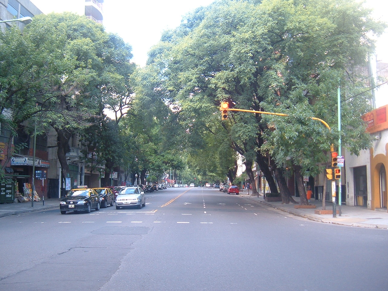 Avenida Pedro Goyena, Buenos Aires